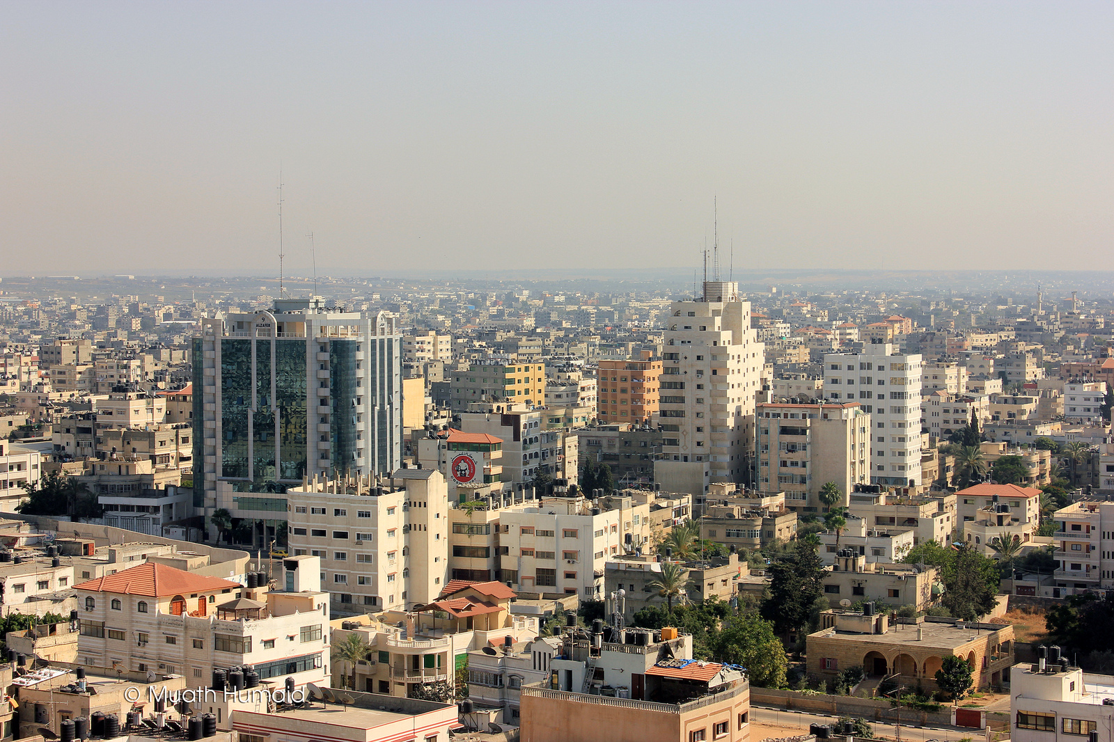 صورة لمدينة غزة تم التقاطها من برج الشروق و يظهر فيها الجزء الشرقي من المدينة